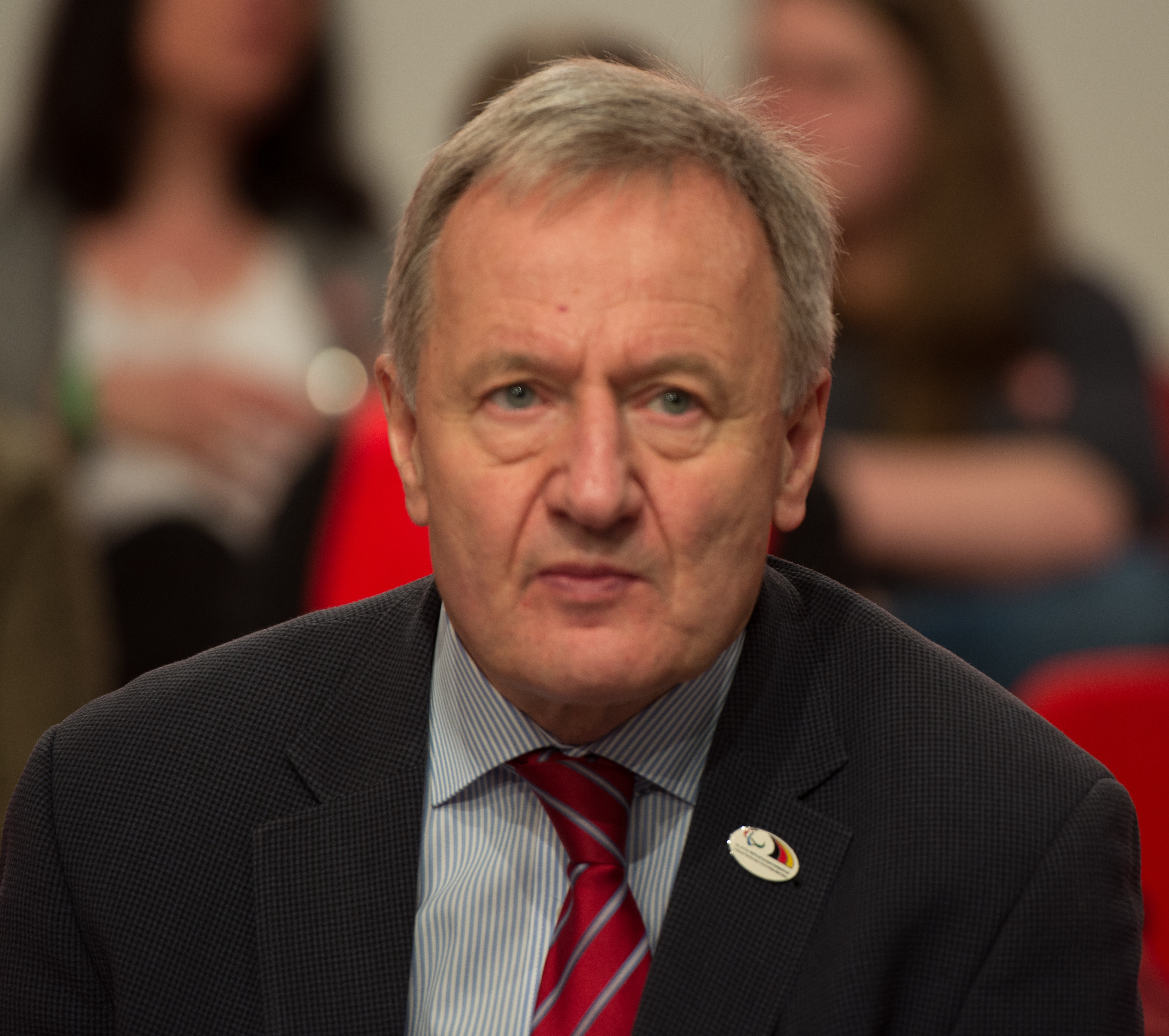 Friedhelm Julius Beucher, SPD, auf dem SPD Bundesparteitag am 19. März 2017 in Berlin